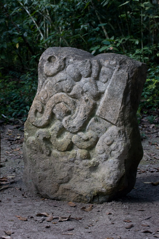 Stella 2, Mirador